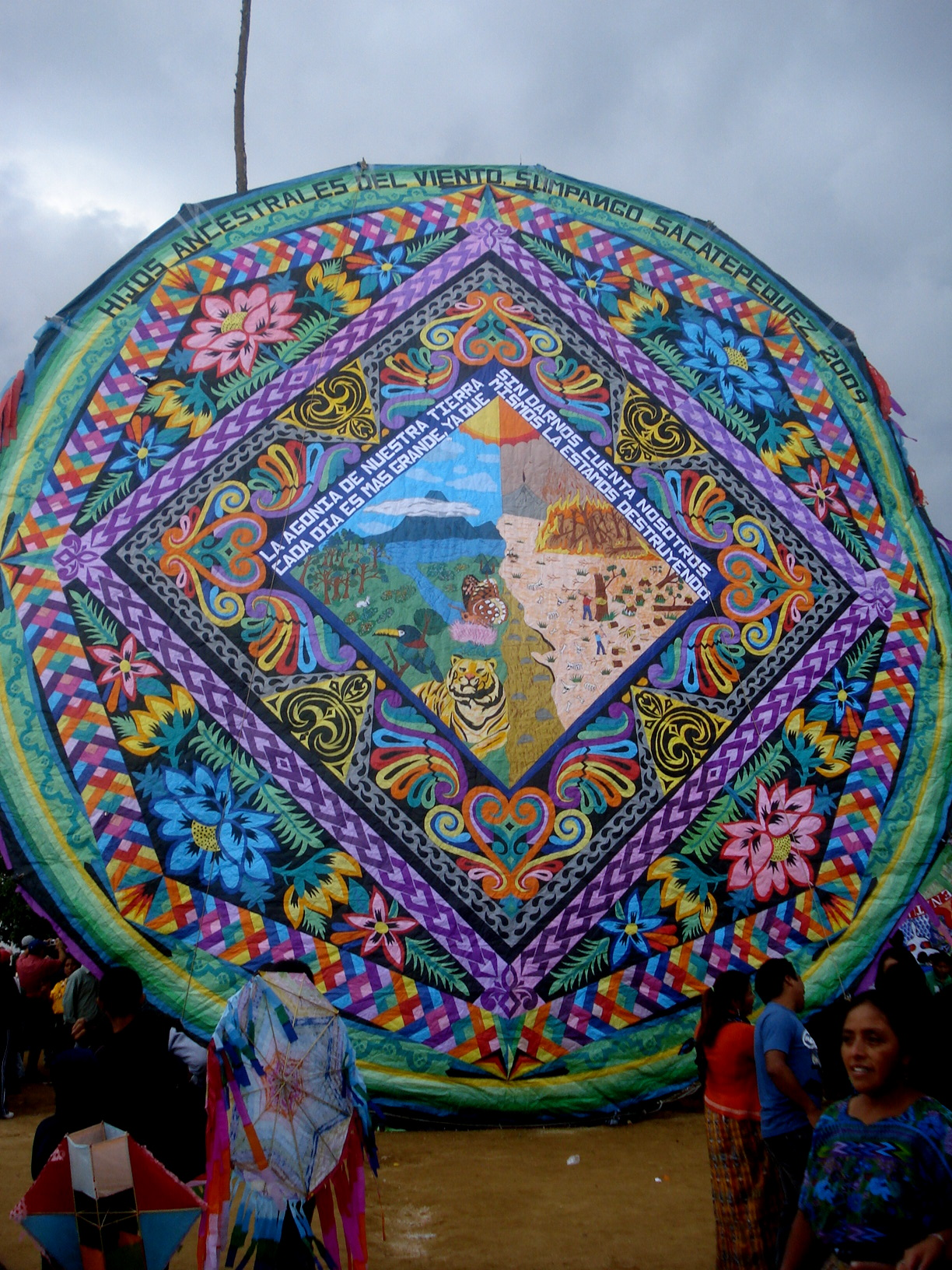 Sumpango-barrilte